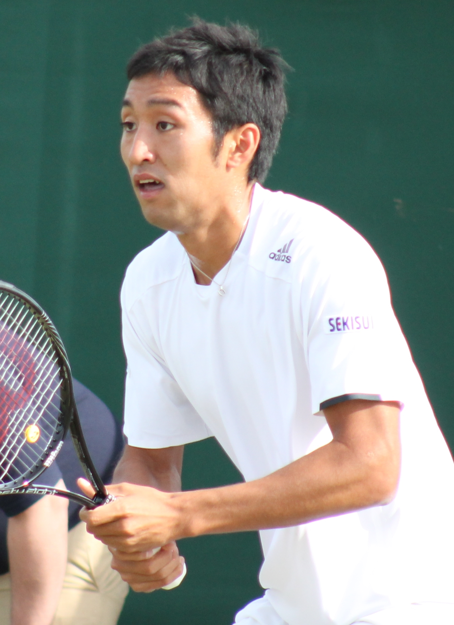 Uchiyama WMQ14 (12)